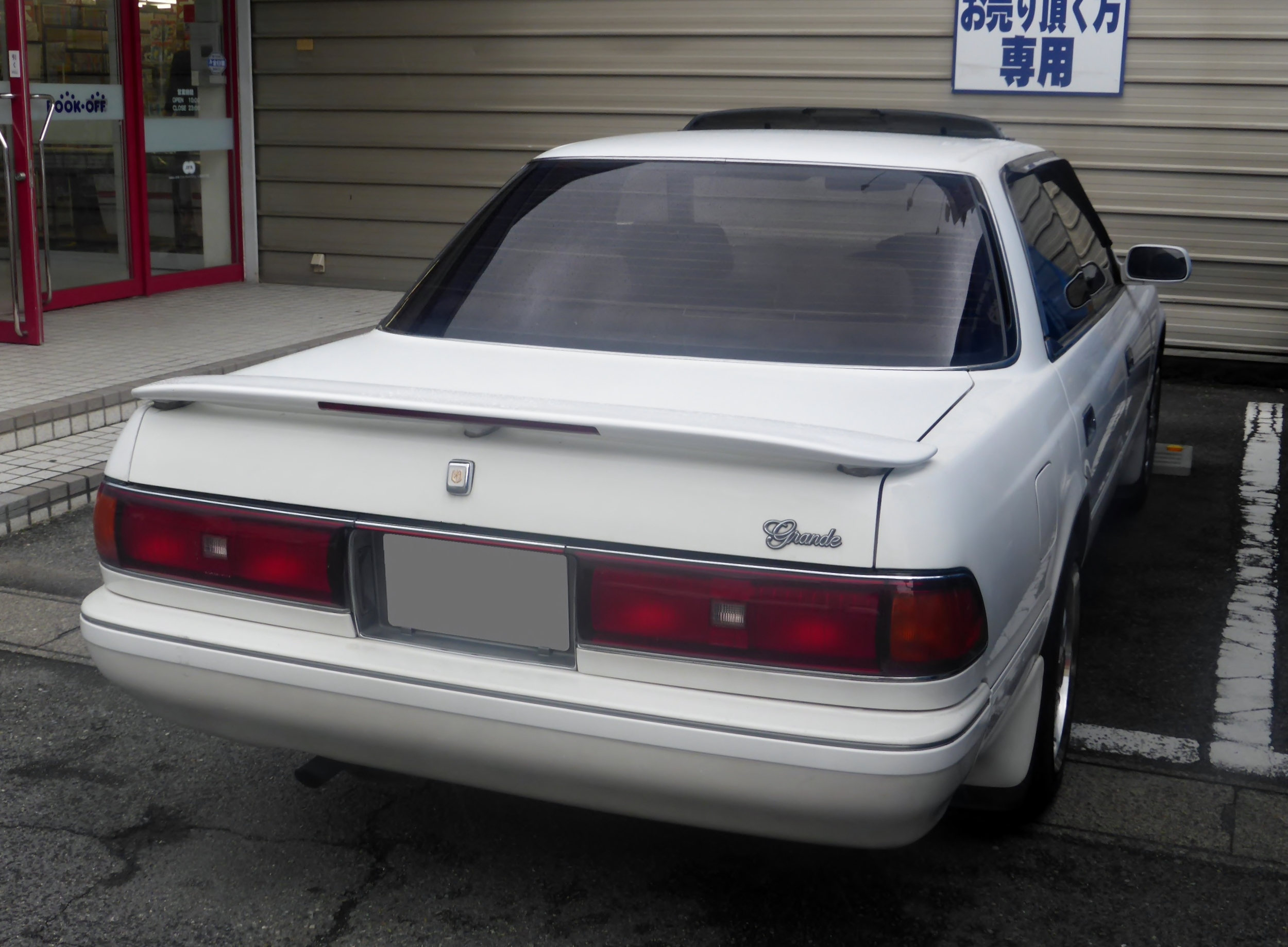 X80型トヨタ・マークIIグランデをリアから撮影。